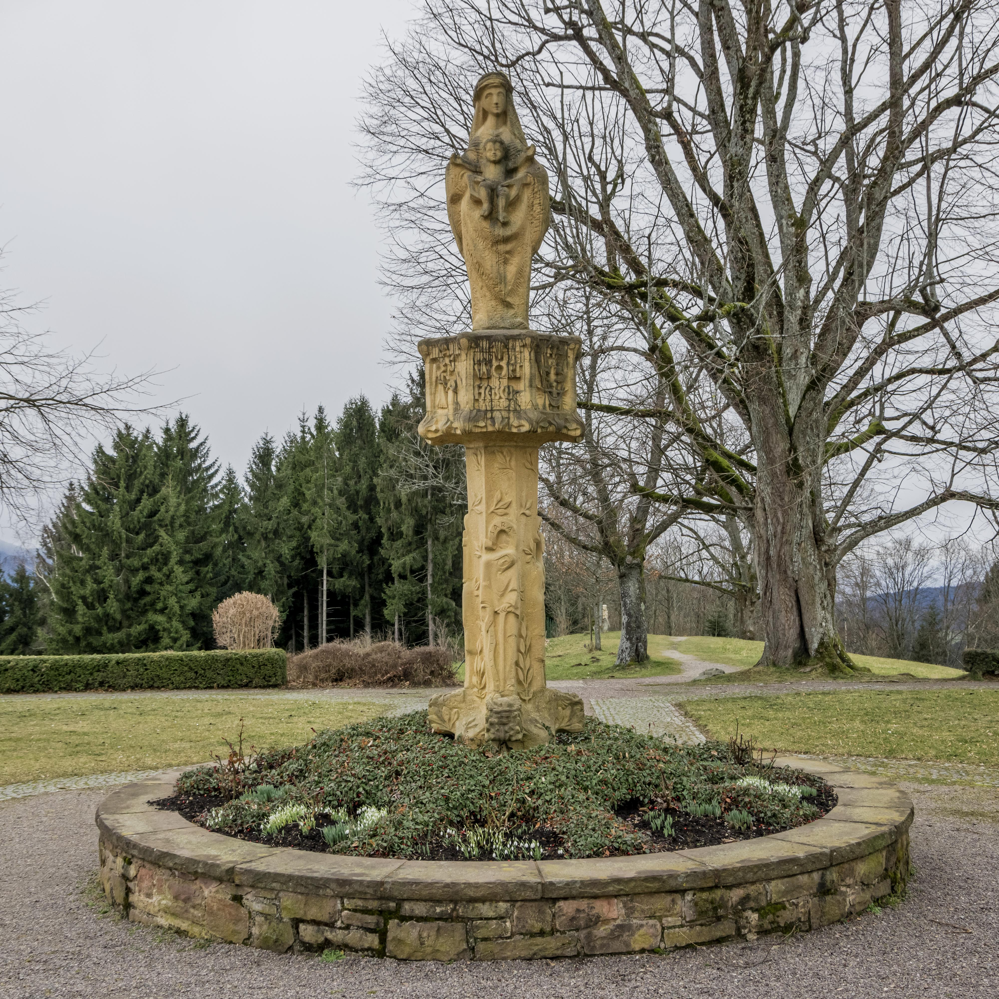 Bilder von der Wallfahrt Maria Lindenberg Marienstatue vor Maria Lindenberg Vorderseite